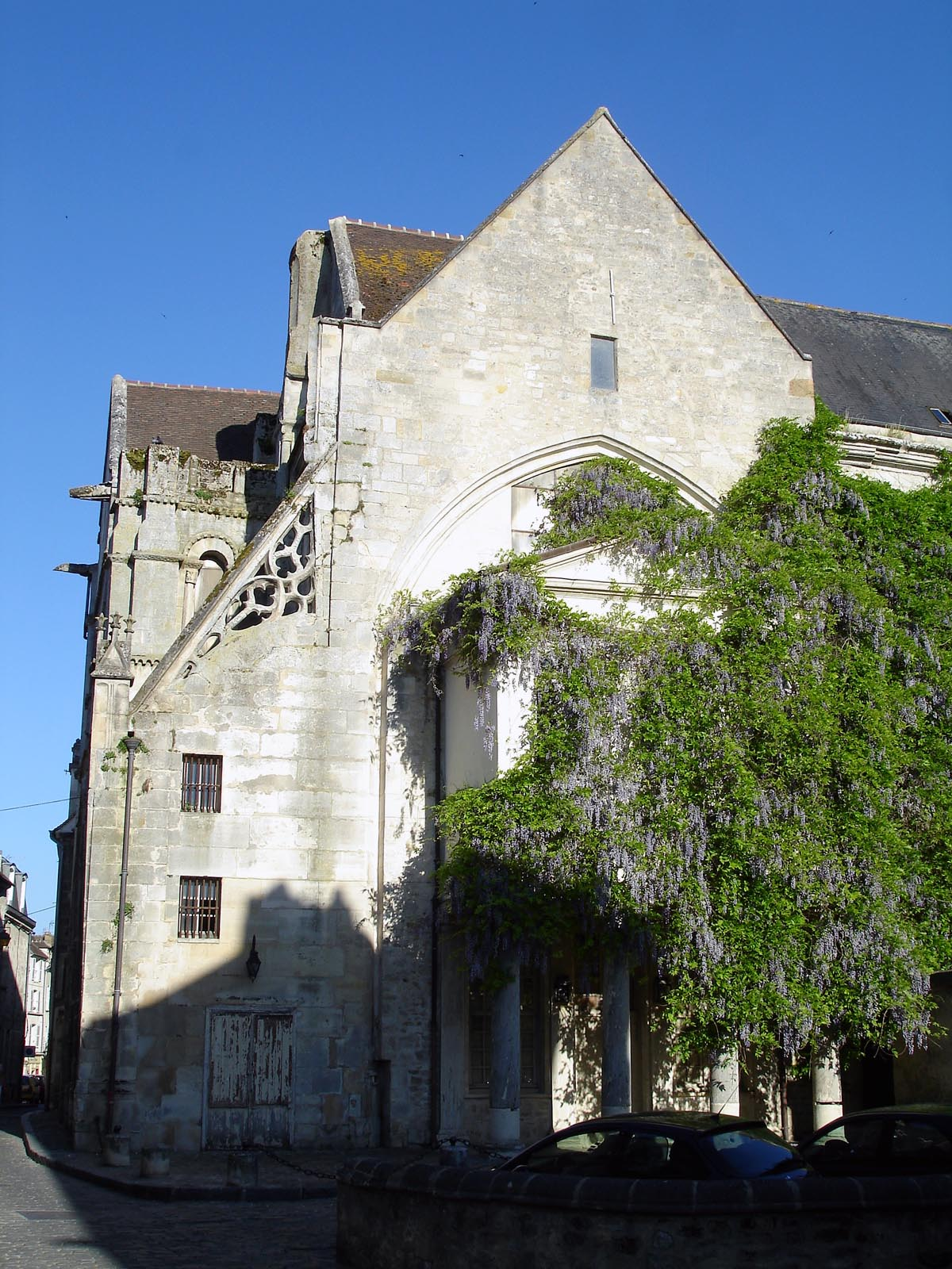 L'ancienne église Saint-Aignan à Senlis, Oise, France.